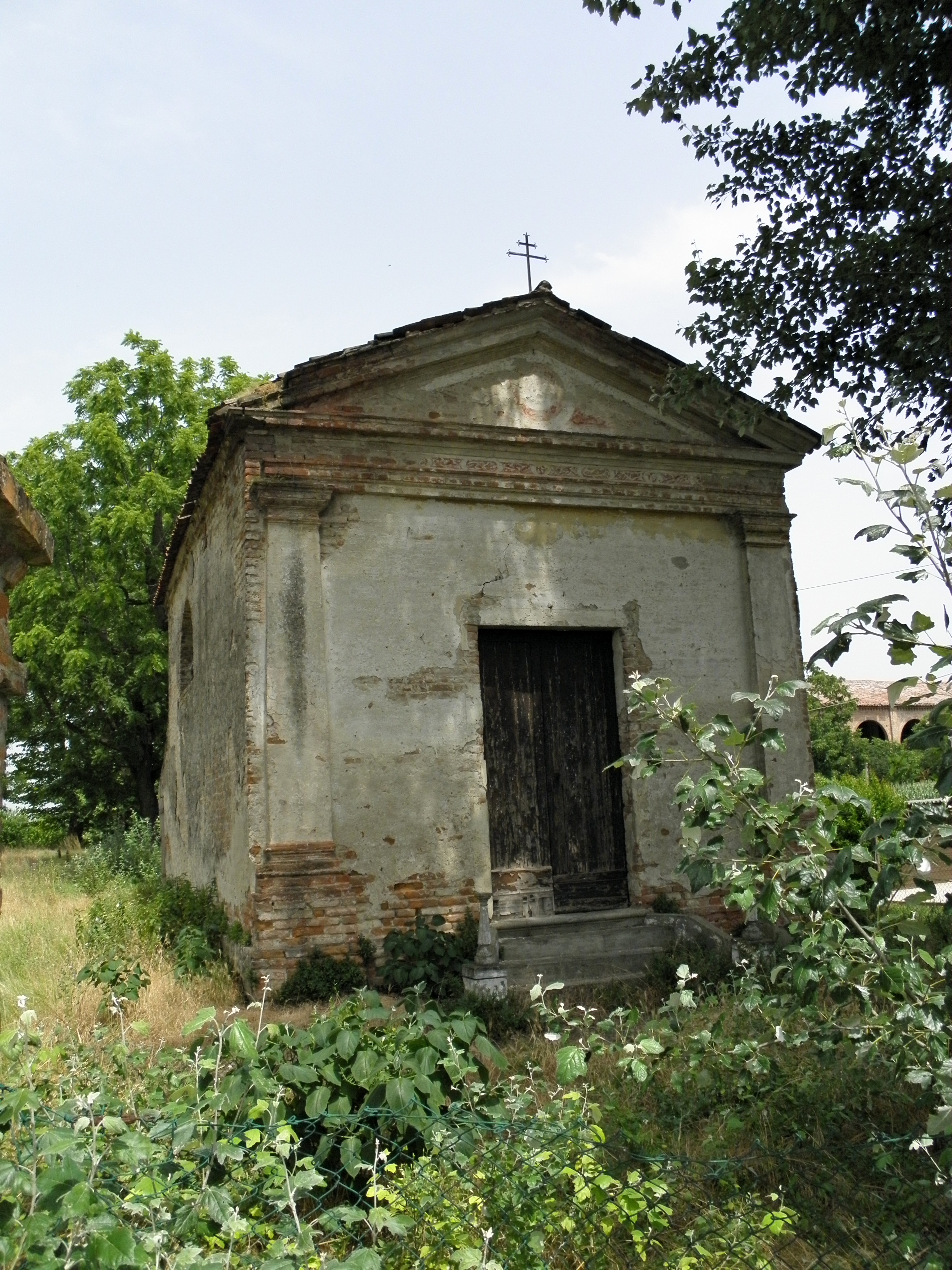 Pozzonovo, località Capolcastro: la cappella gentilizia di Villa Capolcastro Centanini.